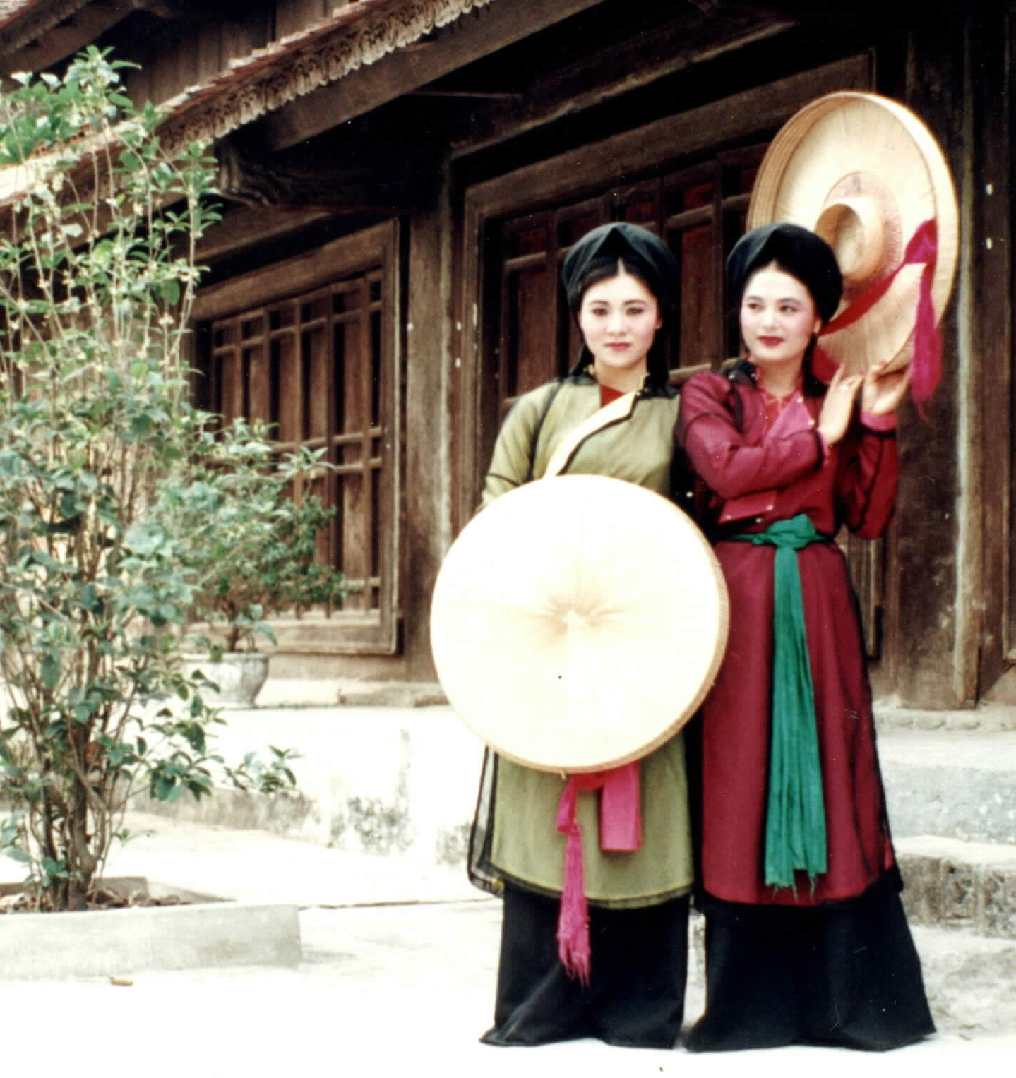 身着四身襖的越南婦女